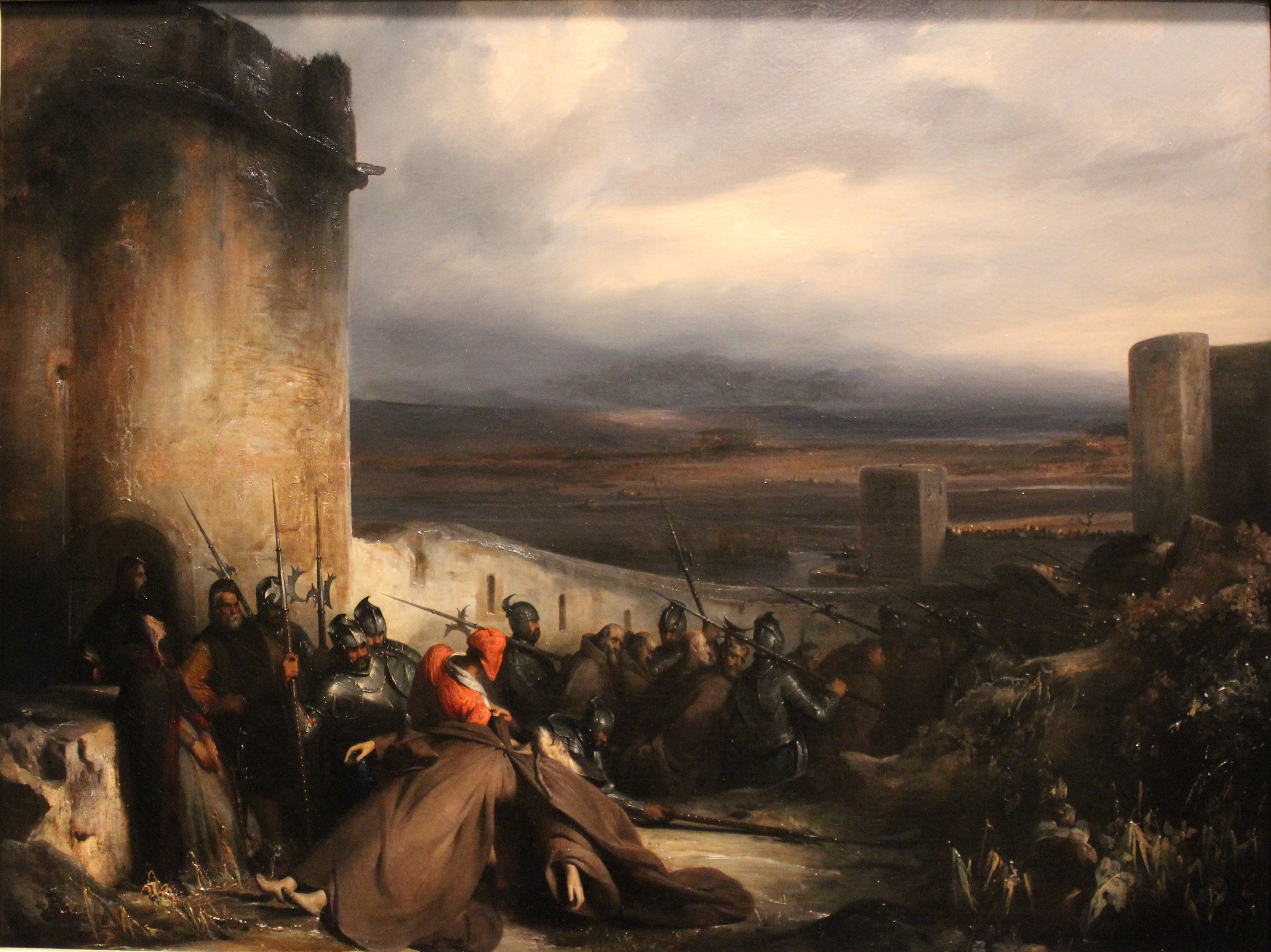 Les Cordeliers. Épisode du siège de Metz. Exposé au MBA Lyon en 2014, dans le cadre de l'exposition L'invention du passé. Histoires de cœur et d'épée 1802-1850.